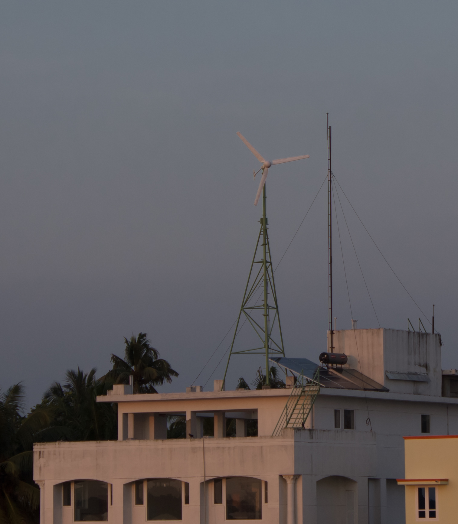 കെട്ടിടത്തിനുമുകളിൽ സ്ഥാപിച്ചിരിക്കുന്ന കാറ്റാടിയന്ത്രം. കൊച്ചിയിലെ കാഴ്ച്ച.